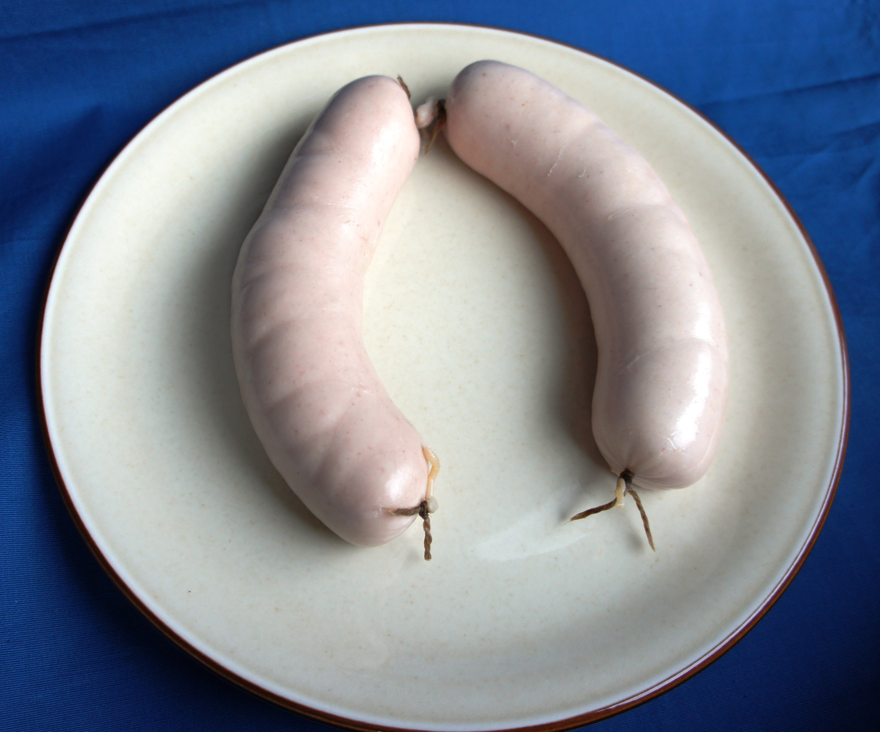 Ein Paar Appenzeller Siedwürste, ungekocht.